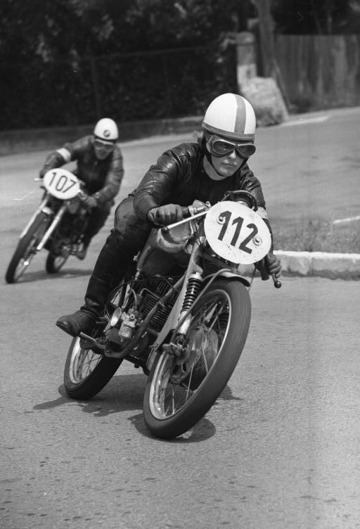 Zentralbild/Schaar 15.7.1963 Motorrad-Rennsport: 15 Staaten auf dem Schleizer-Dreieck Zum 30. Male donnerten am 14.7. auf dem Schleizer-Dreieck die Motoren. Die älteste Rennstrecke Deutschlands sah an diesem Tag Fahrer aus 15 Ländern am Ablauf und hatte damit ein Rekordergebnis zu verzeichnen. Gleichzeitig stellte das Rennen einen Höhepunkt in der Vorbereitung des in drei Wochen in Leipzig stattfindenden IV. Deutschen Turn- und Sportfestes dar. UBz.: Helga Steudel (MZ Zwickau) belegte als einzige weibliche Fahrerin des Rennens in der Klasse 125 ccm - Ausweis einen hervorragenden 2. Platz.